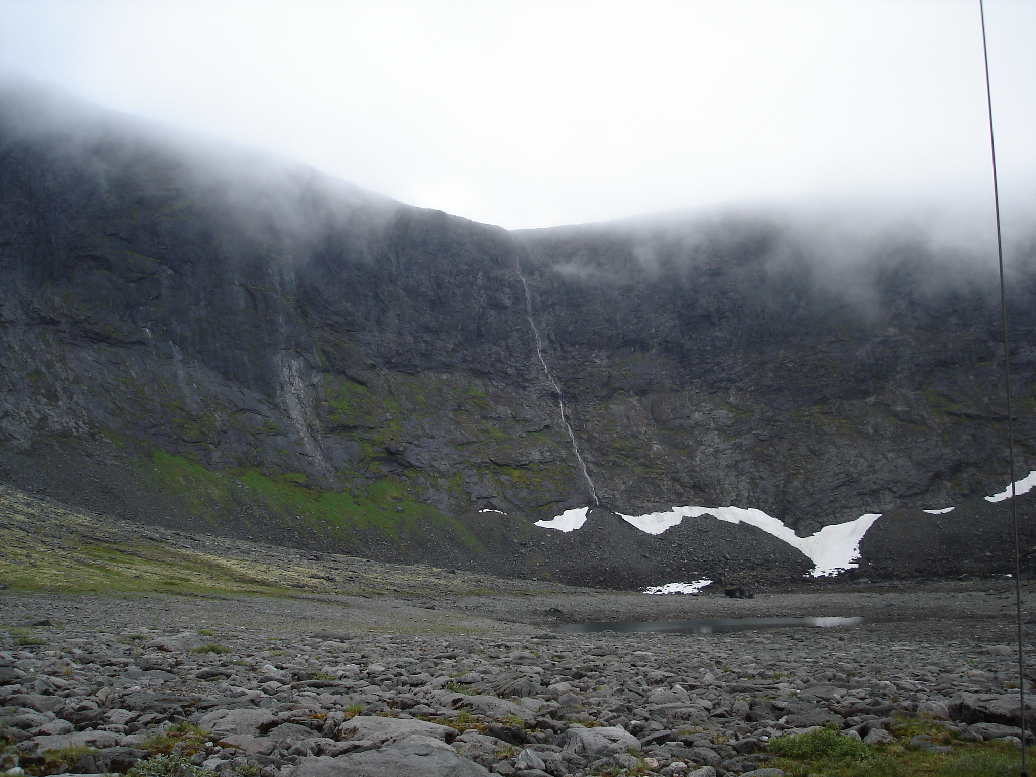 Первый цирк Раслака